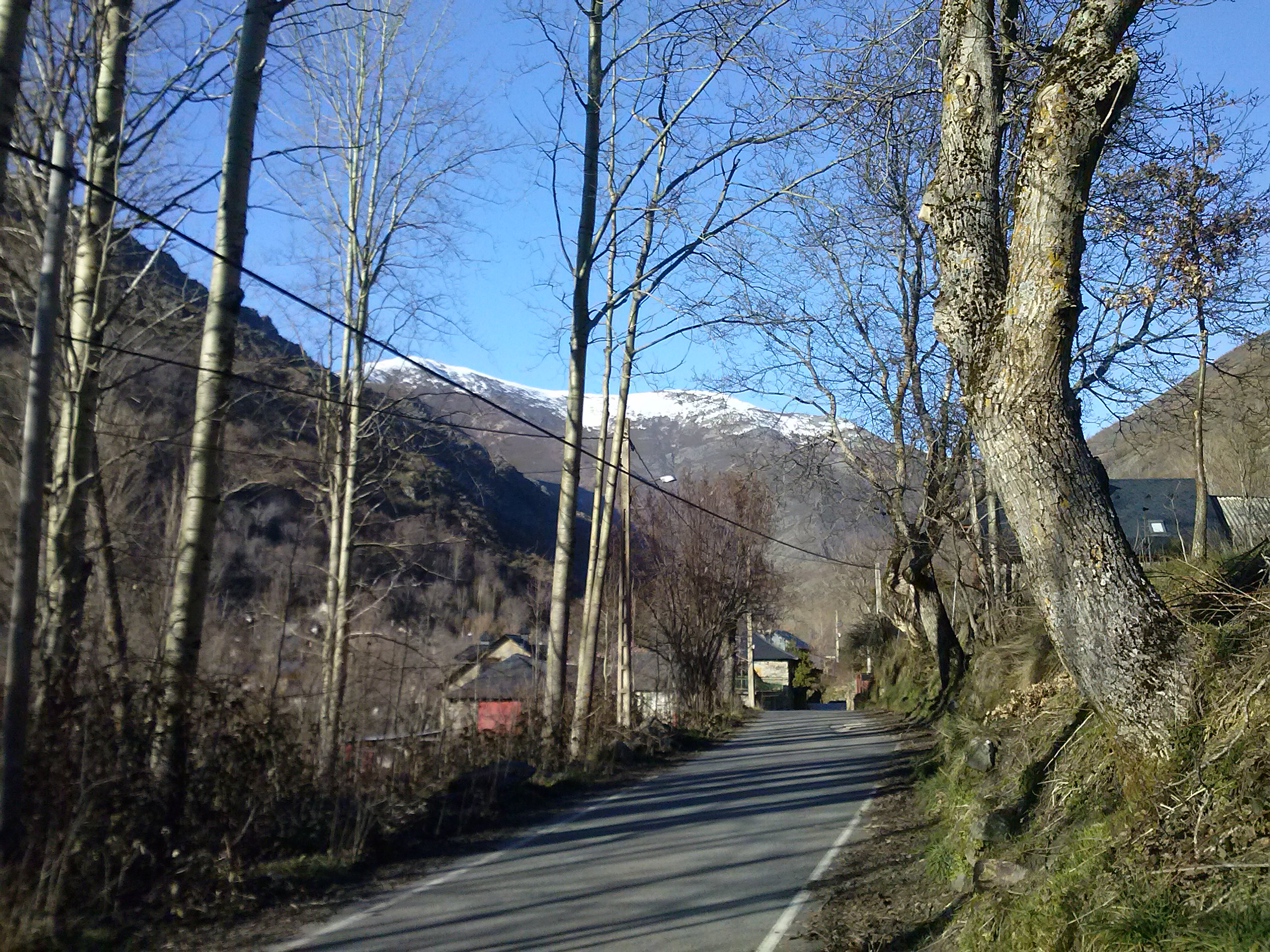 Colinas del Campo de Martín Moro Toledano, en Igüeña (provincia de León, España).